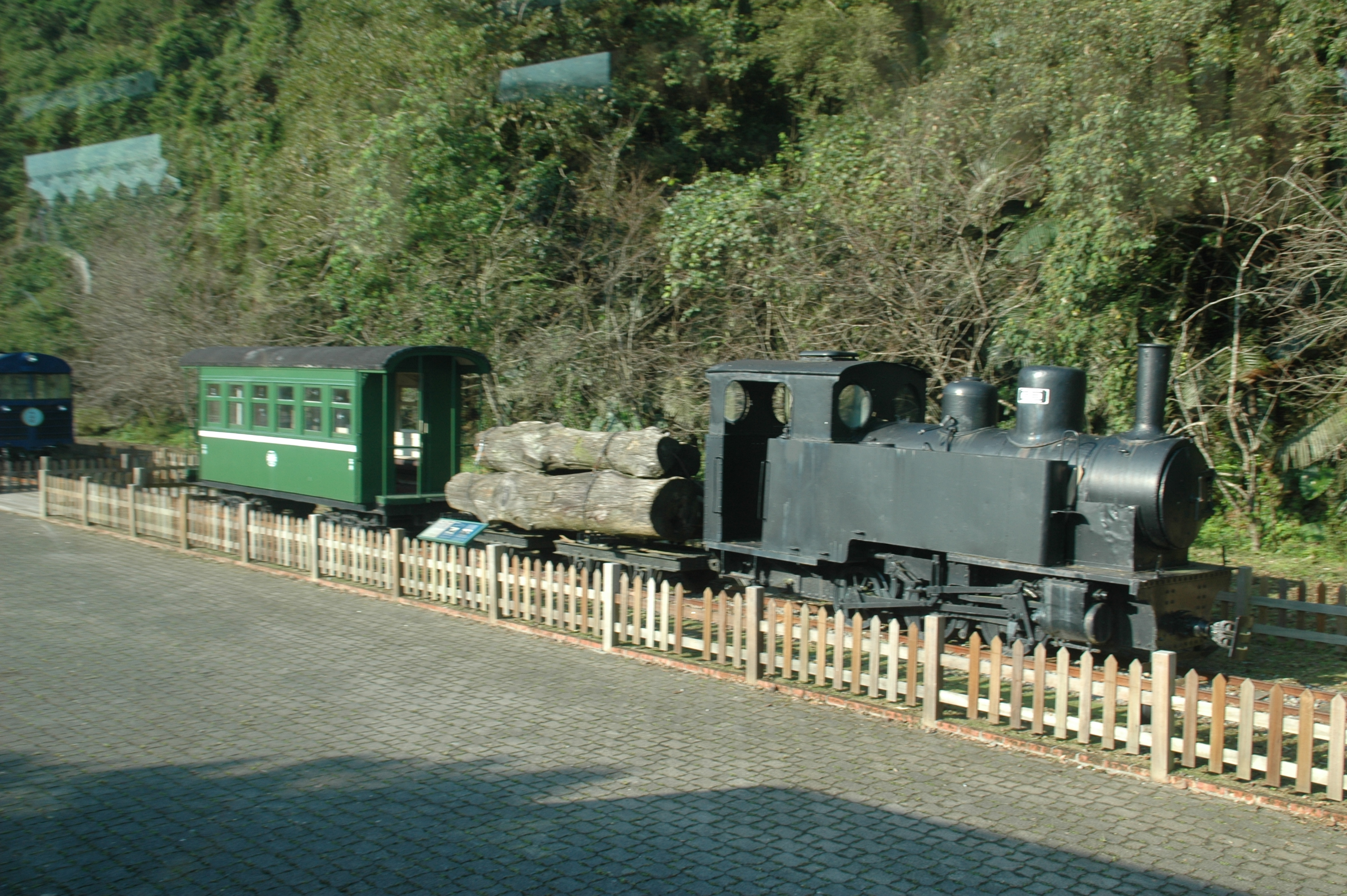 中文（台灣）: 宜蘭棲蘭山檜木林1